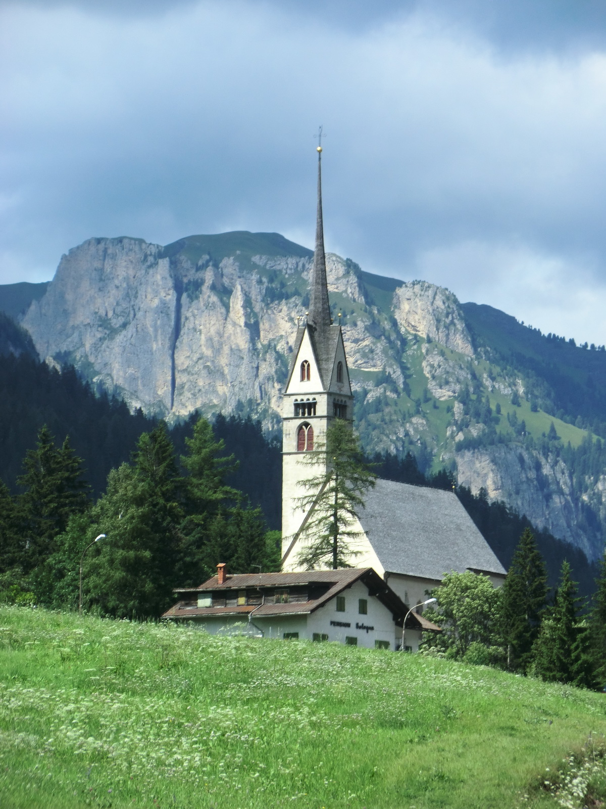 San Giovanni, Vigo di Fassa, Italy